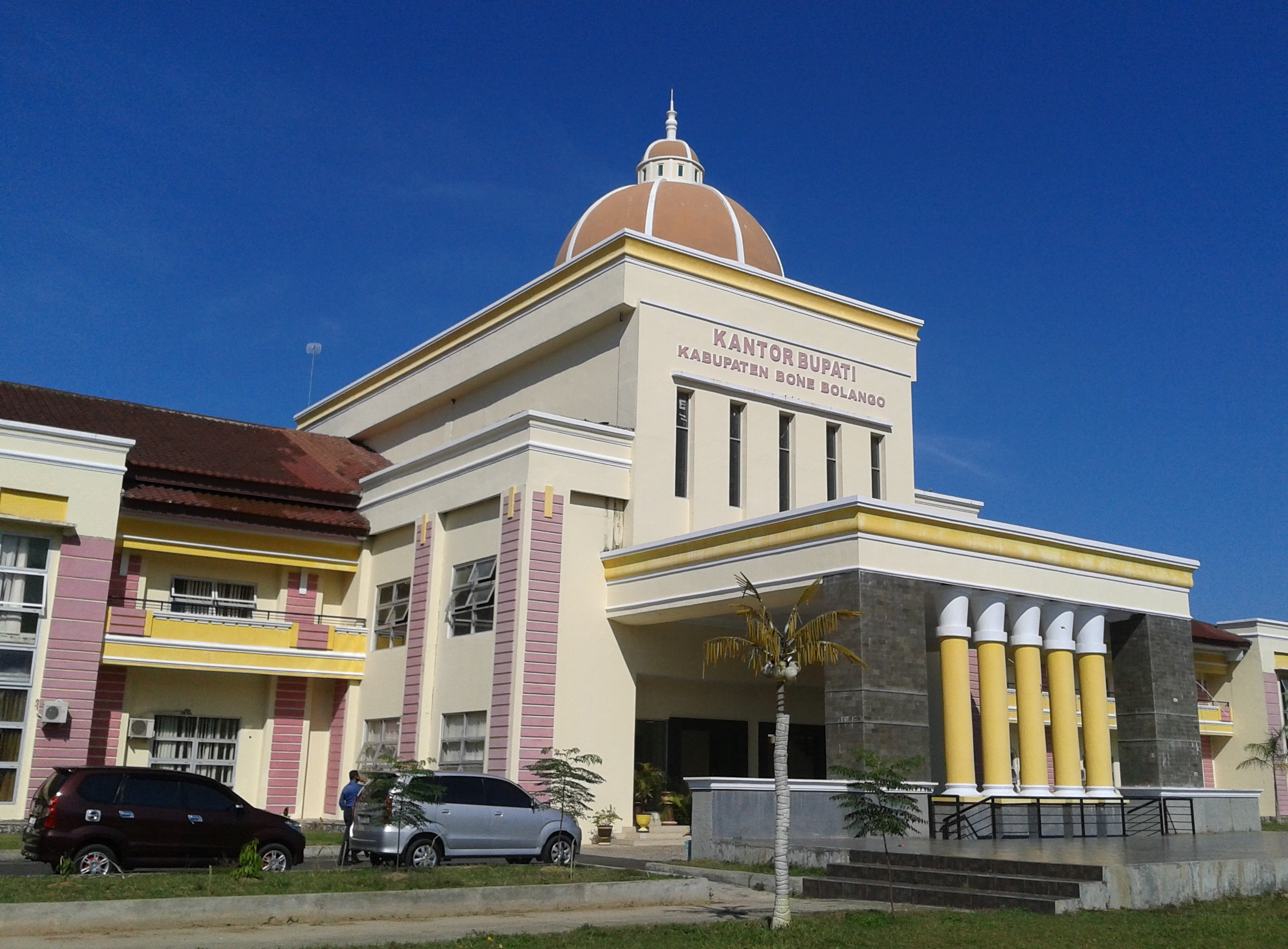 Foto Kantor Bupati Bone Bolango dari samping.